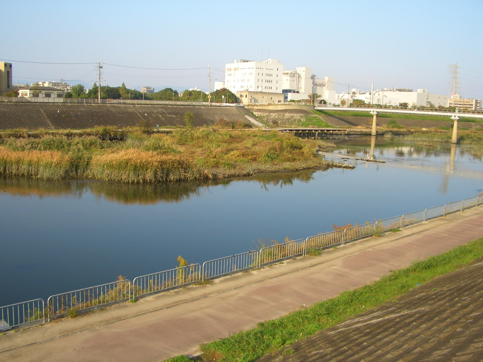 Ai_River in Osaka,Japan. 安威川（大阪府摂津市付近）